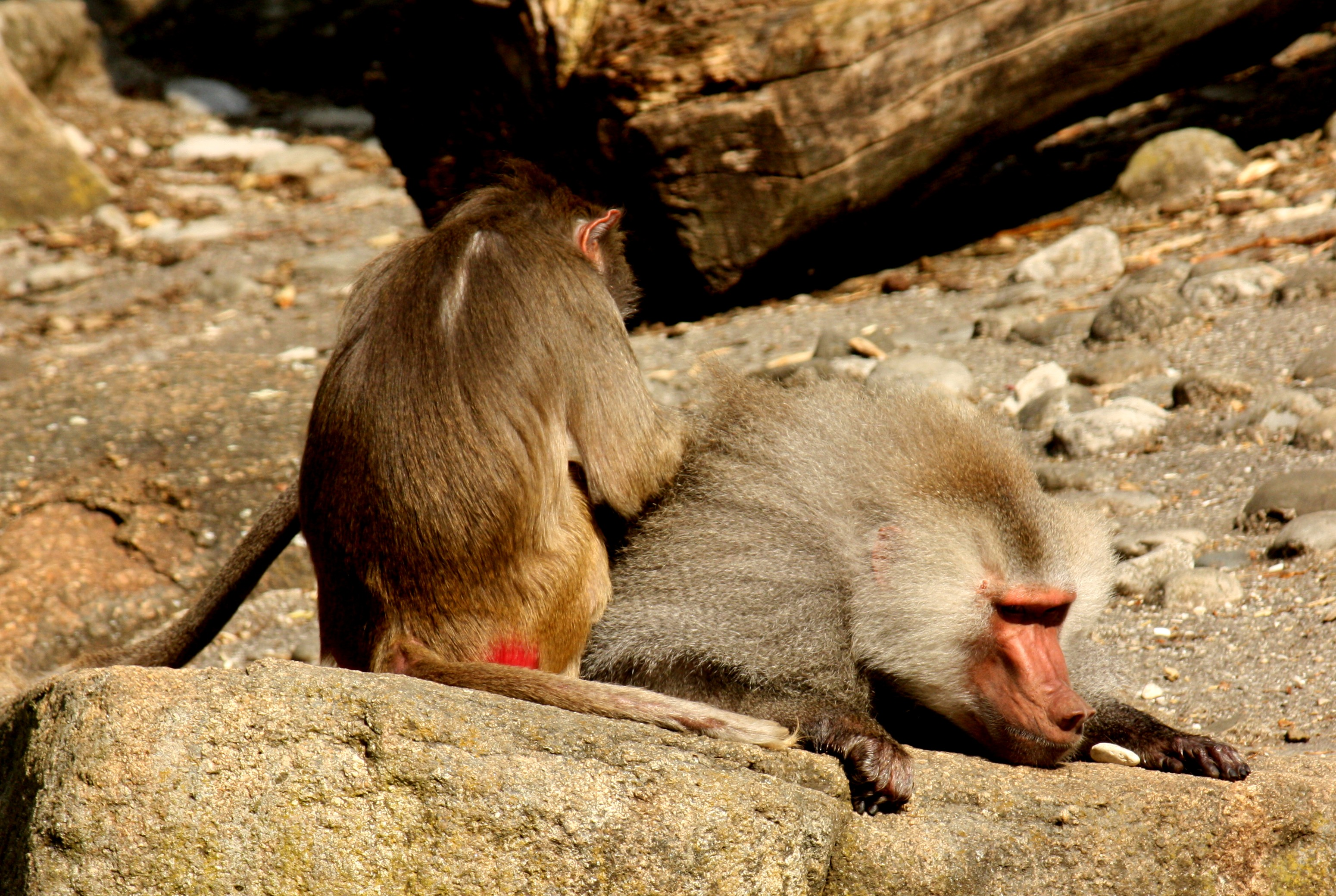 Mantelpaviane bei der Fellpflege in Hellabrunn.